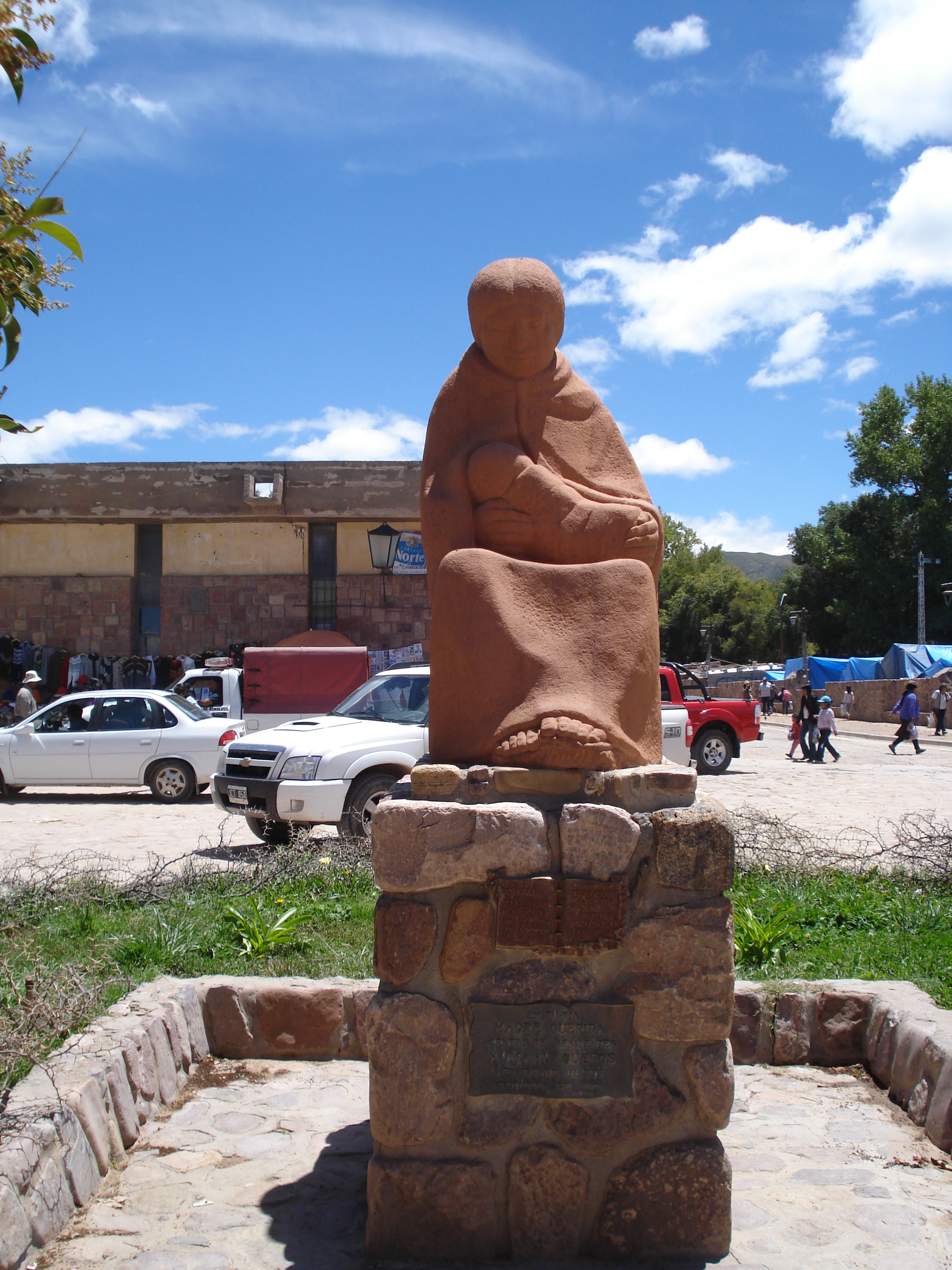 Pueblo de Purmamarca